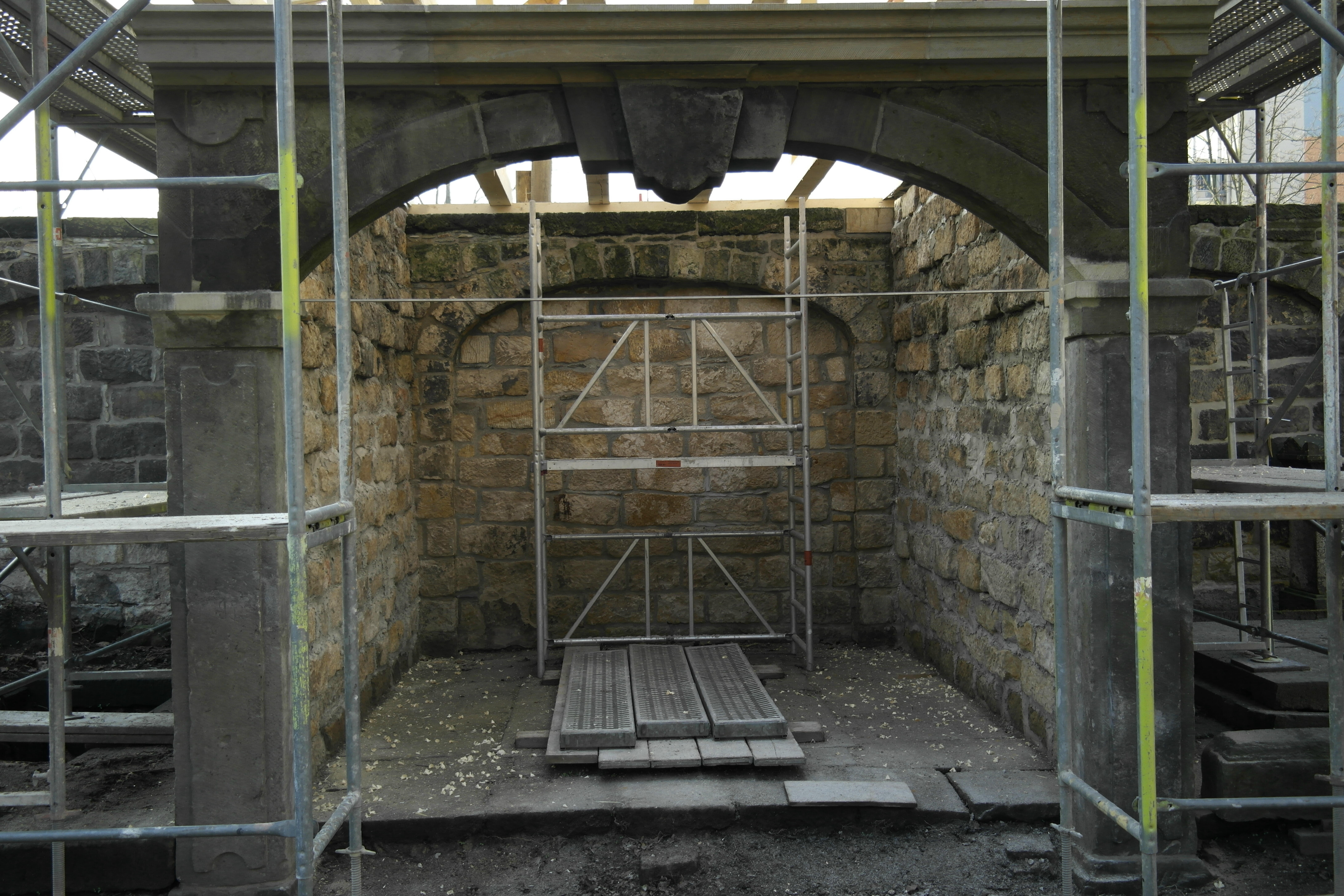 Wiedererrichtung des Güntzgrufthauses, Dachstuhl.